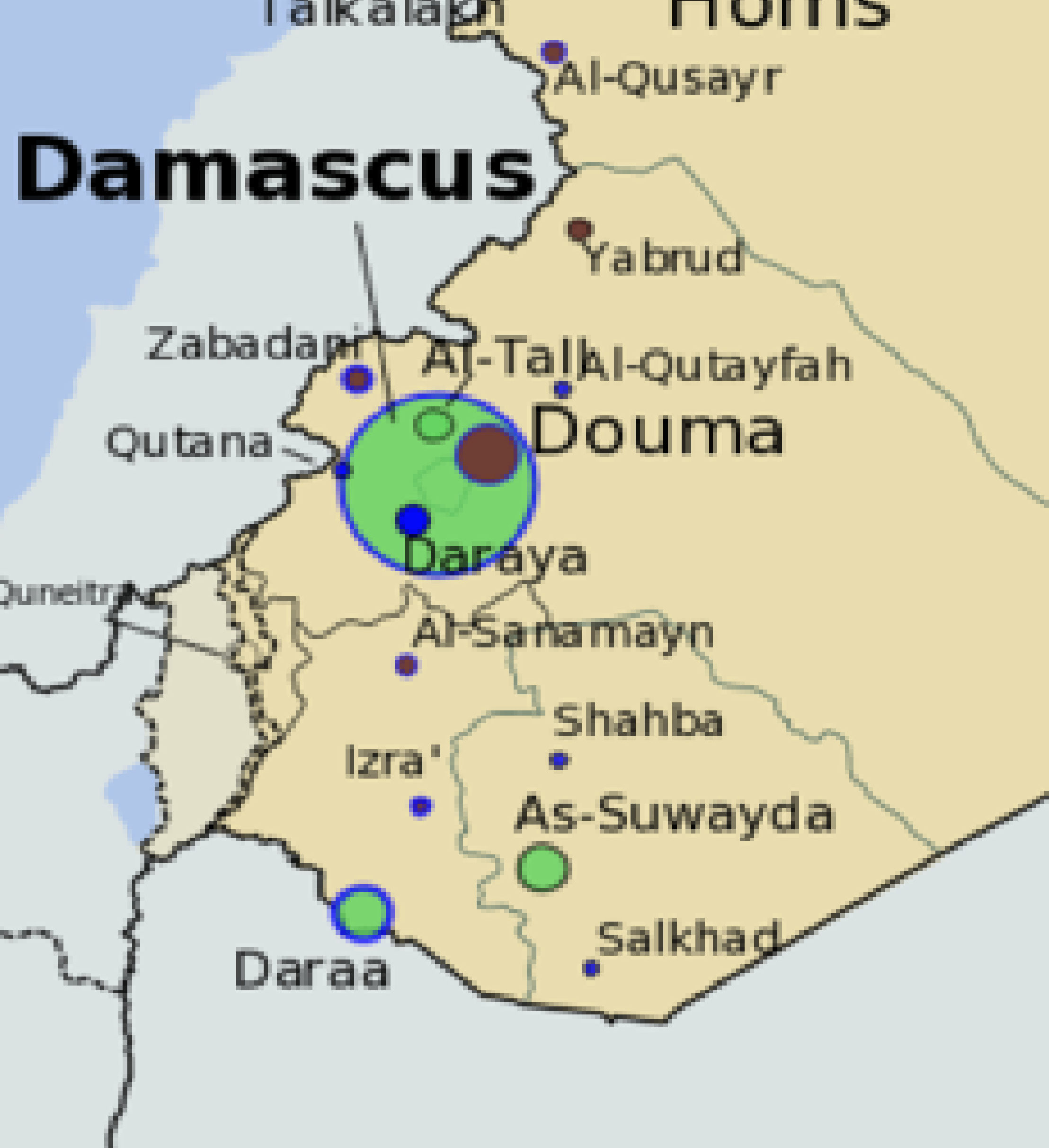 Douma, Syria ubicación